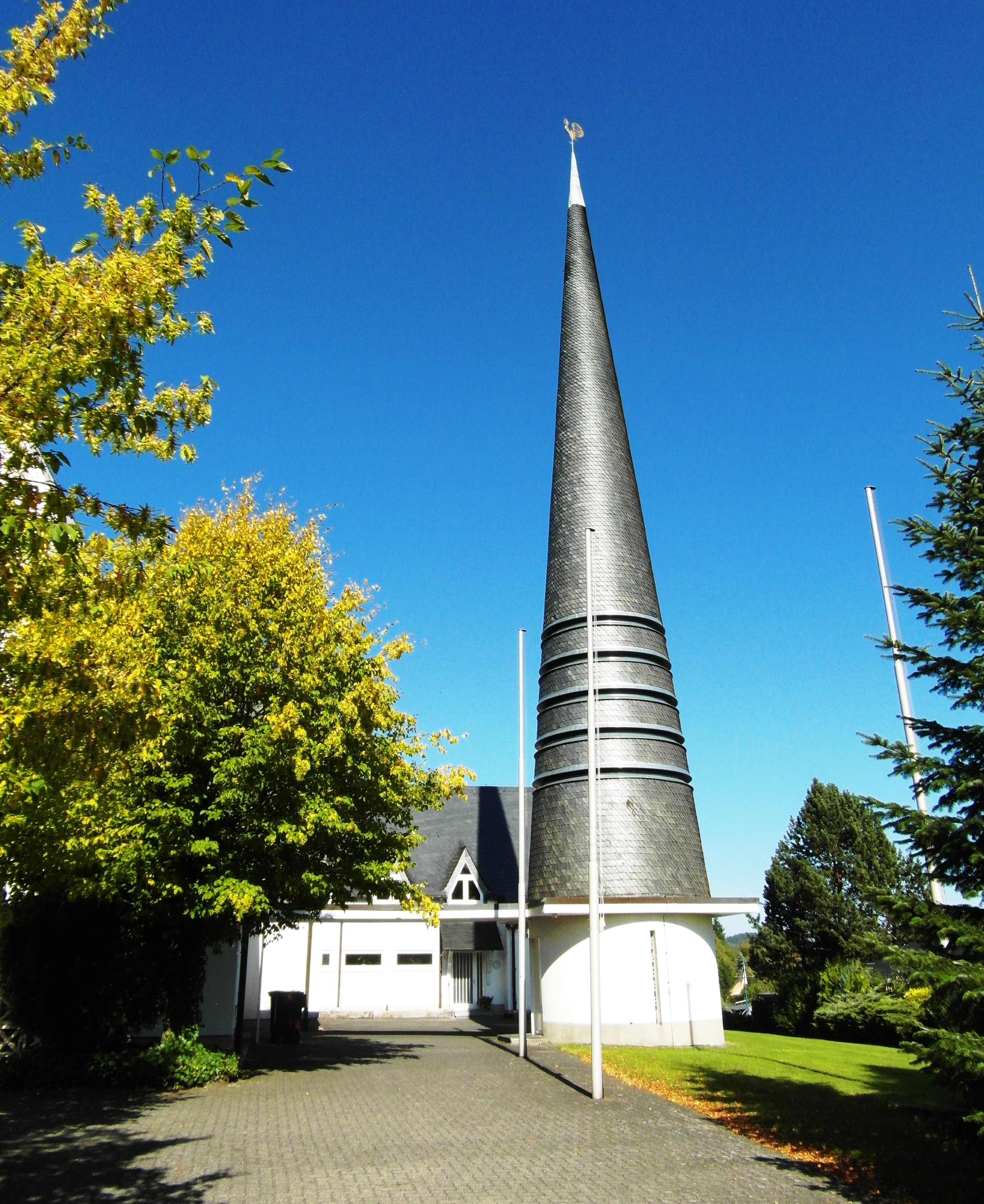 Pfarrkirche St. Antonius von Padua in Windhausen (Attendorn)